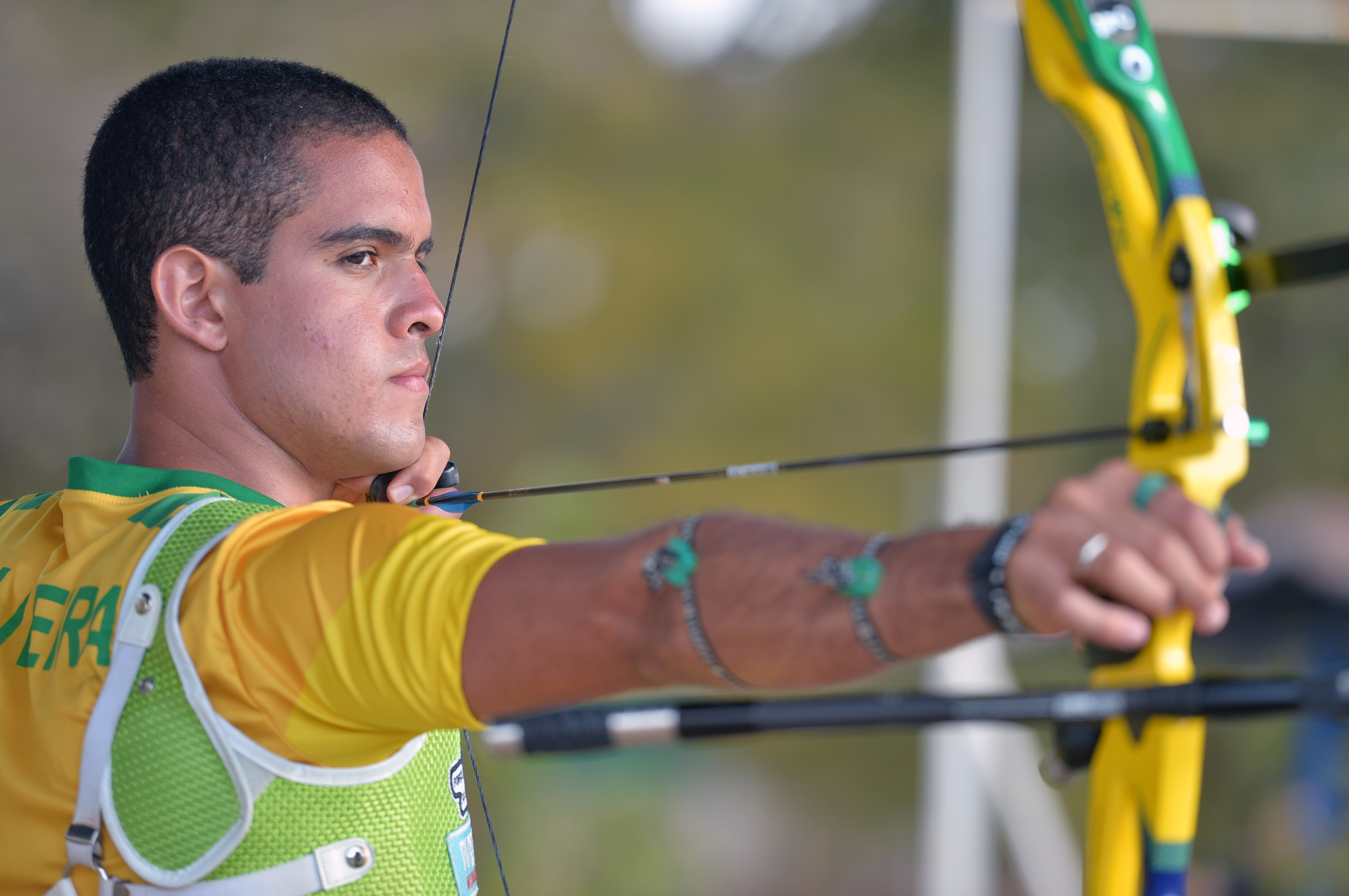 08/07/2016, Brasília - DF Fotos: Tereza Sobreira